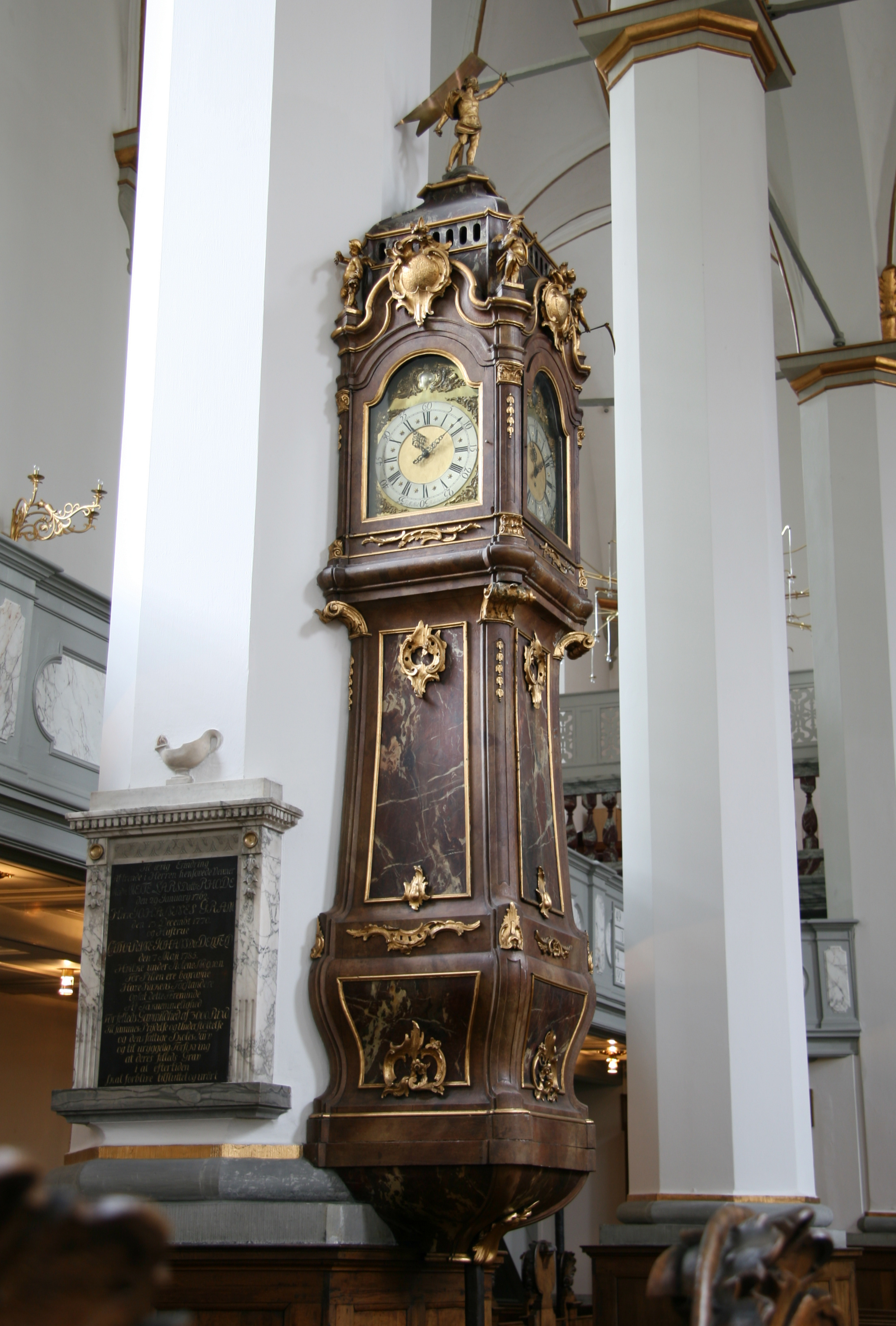 Trinitatis Kirke, Copenhagen, Denmark. Standur.